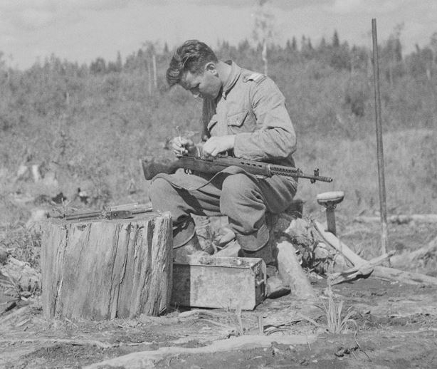 Mannerheim-ristin ritari Sauli Kousa puhdistaa kivääriään 18.7.1942